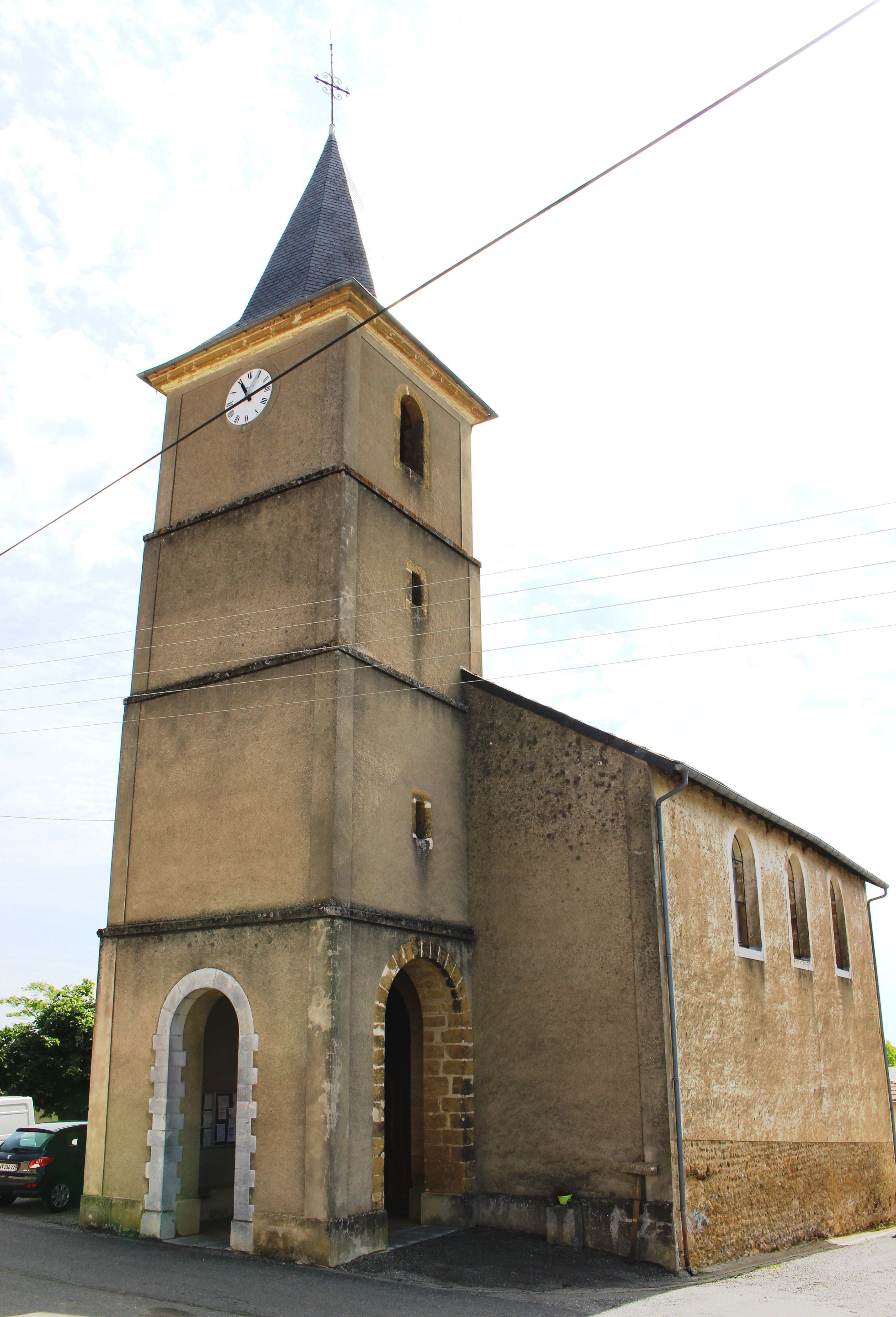 Église Saint-Michel de Castelvieilh (Hautes-Pyrénées)